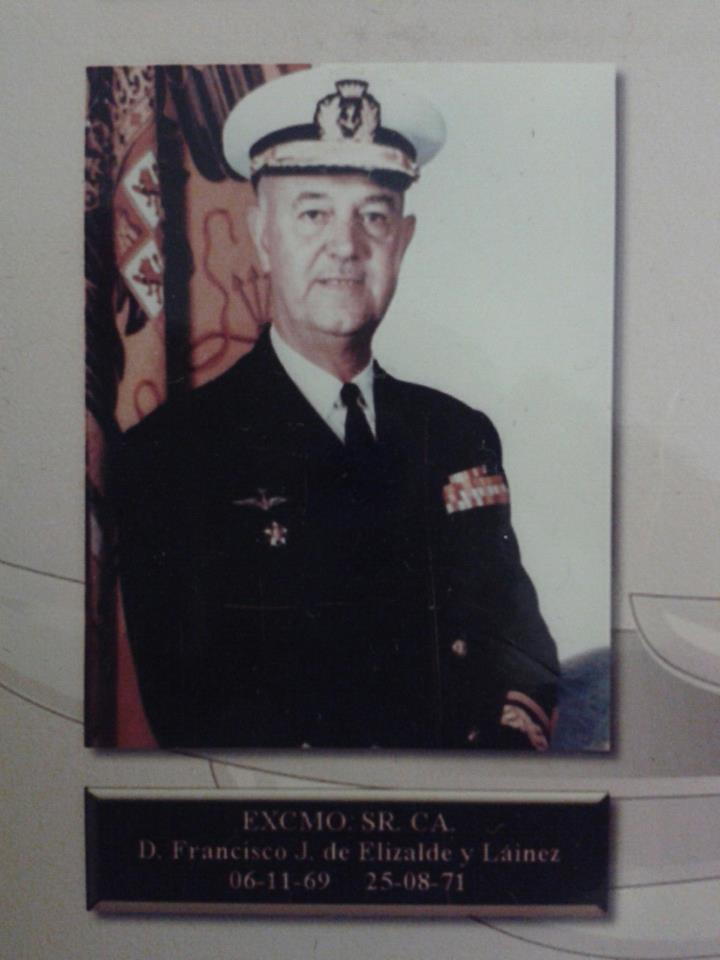 Excmo. Sr. D., Francisco de Elizalde y Laínez en 1969, Contralmirante Jefe de la base Naval de Rota